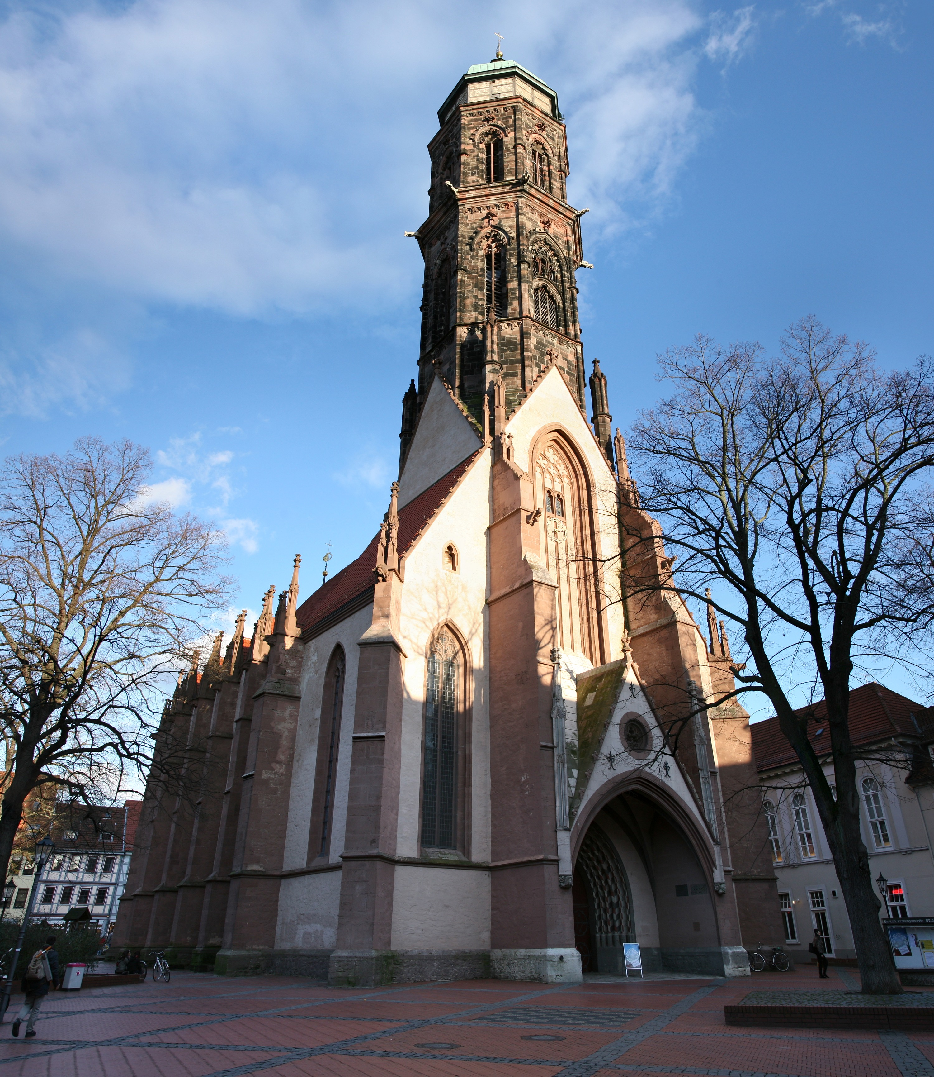 St. Jacobi Church, Göttingen, Germany